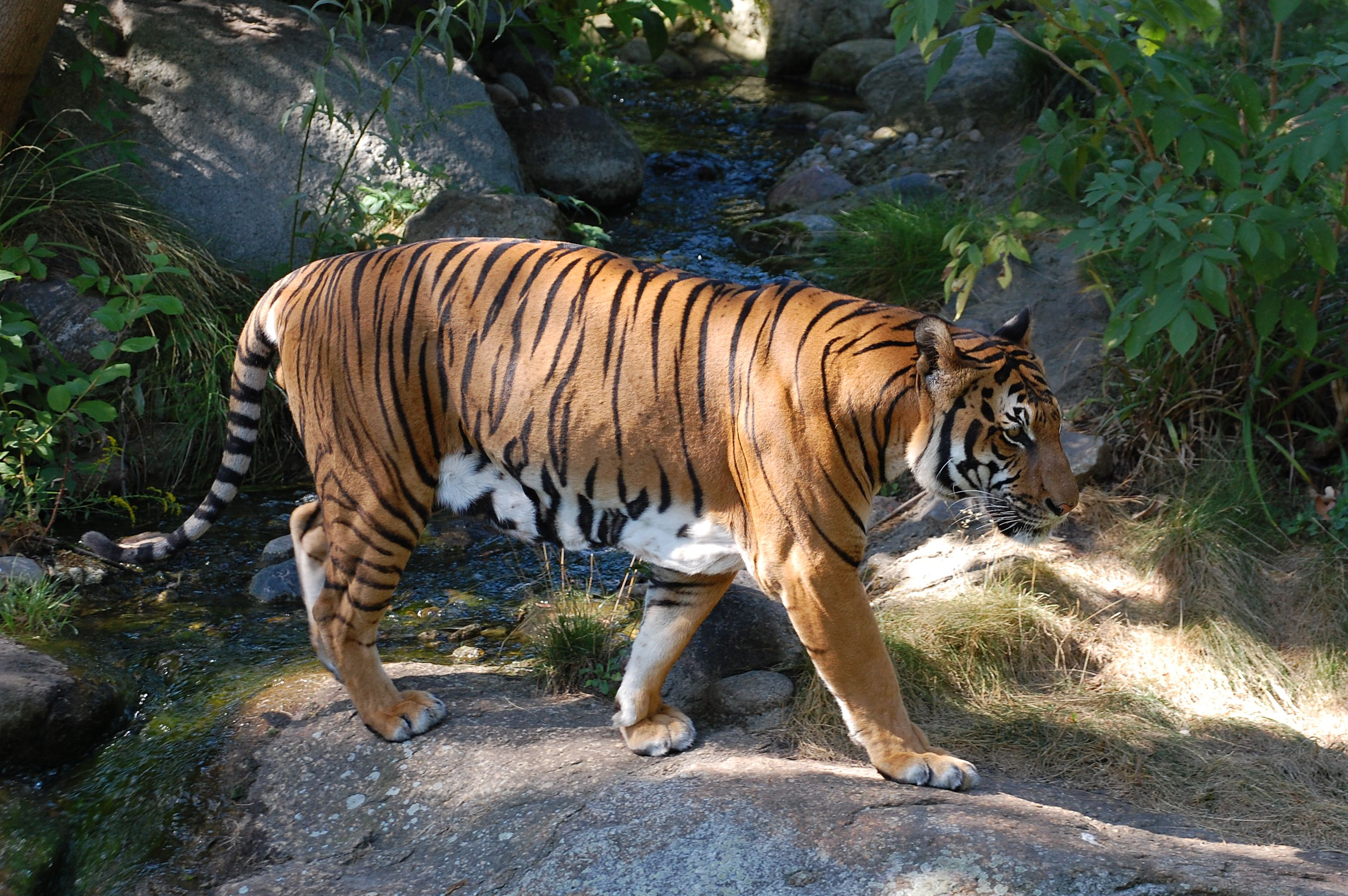 Indochinesischer Tiger (Panthera tigris corbetti), Männchen. Gefangenschaftsaufnahme